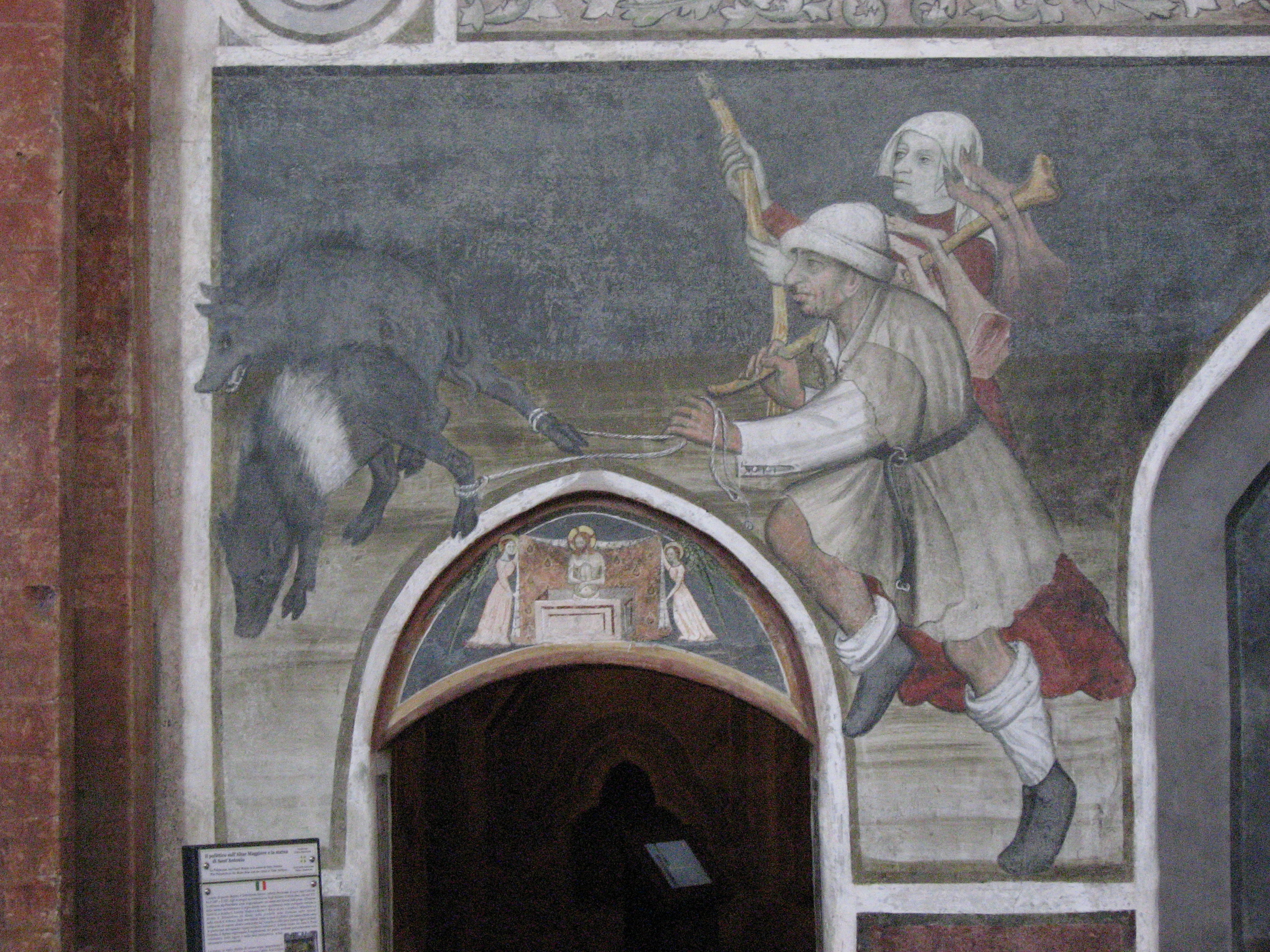 Ciclo di Sant'Antonio di Ranverso This is a photo of a monument which is part of cultural heritage of Italy. This monument needs check. The problem is the following: this monument has an incorrect ID (see the monument list). This monument needs check. The problem is the following: this monument is not listed in the monument list.